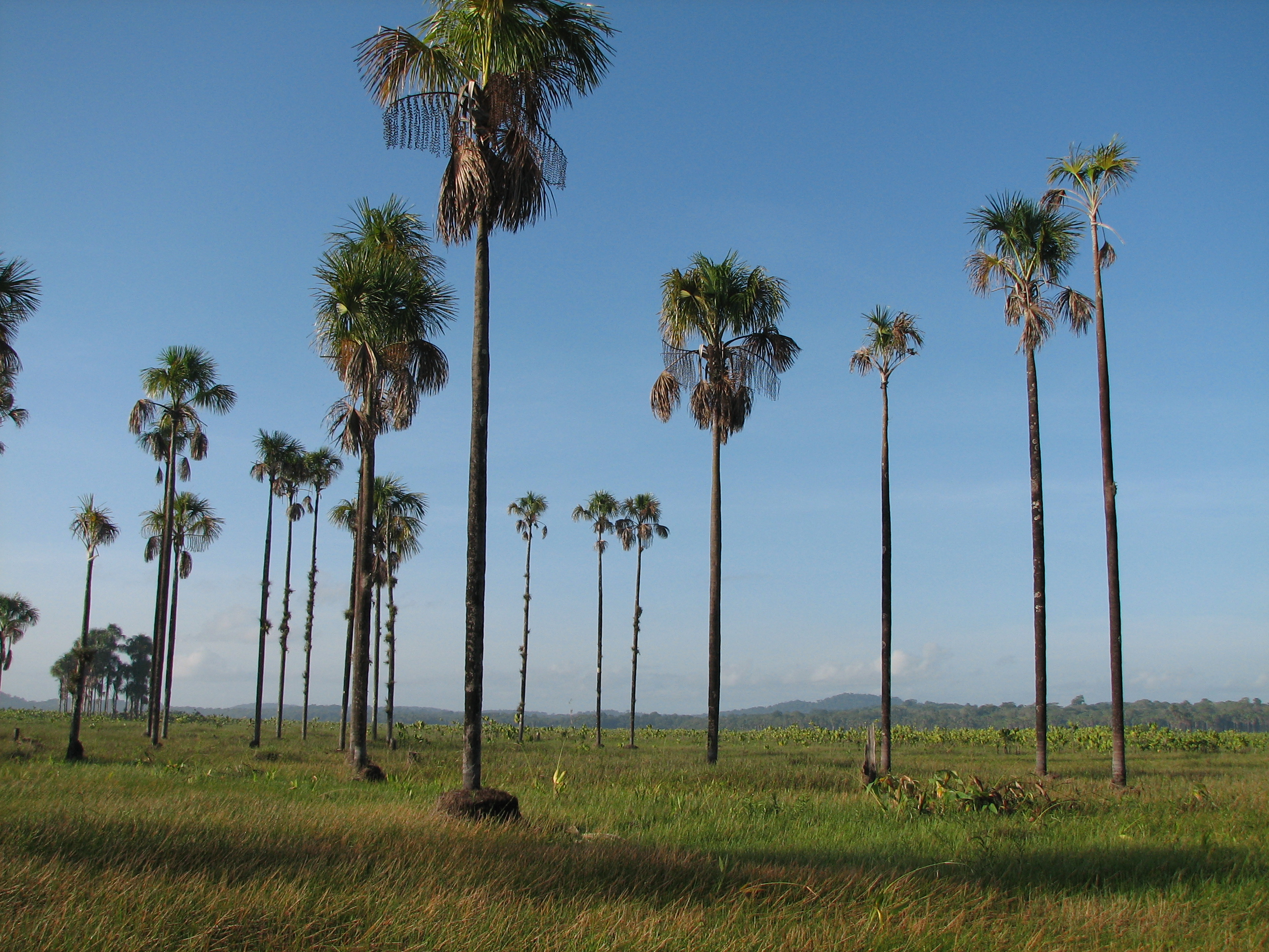 Palmeiras em campo savânico da Amazônia